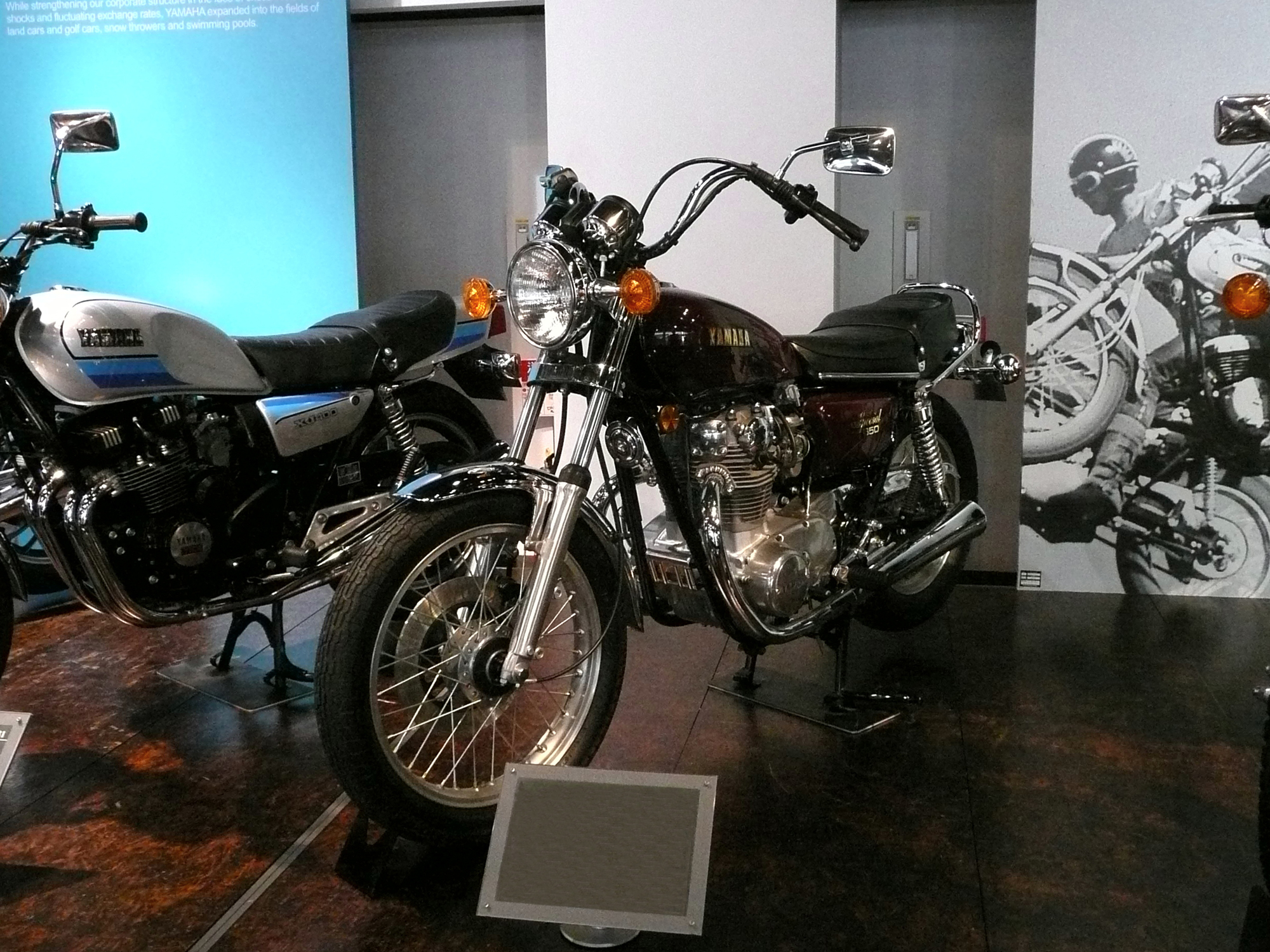 ヤマハ・XS650D 1978 ヤマハコミュニケーションプラザにて撮影